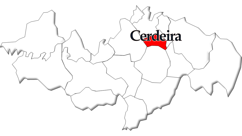 População